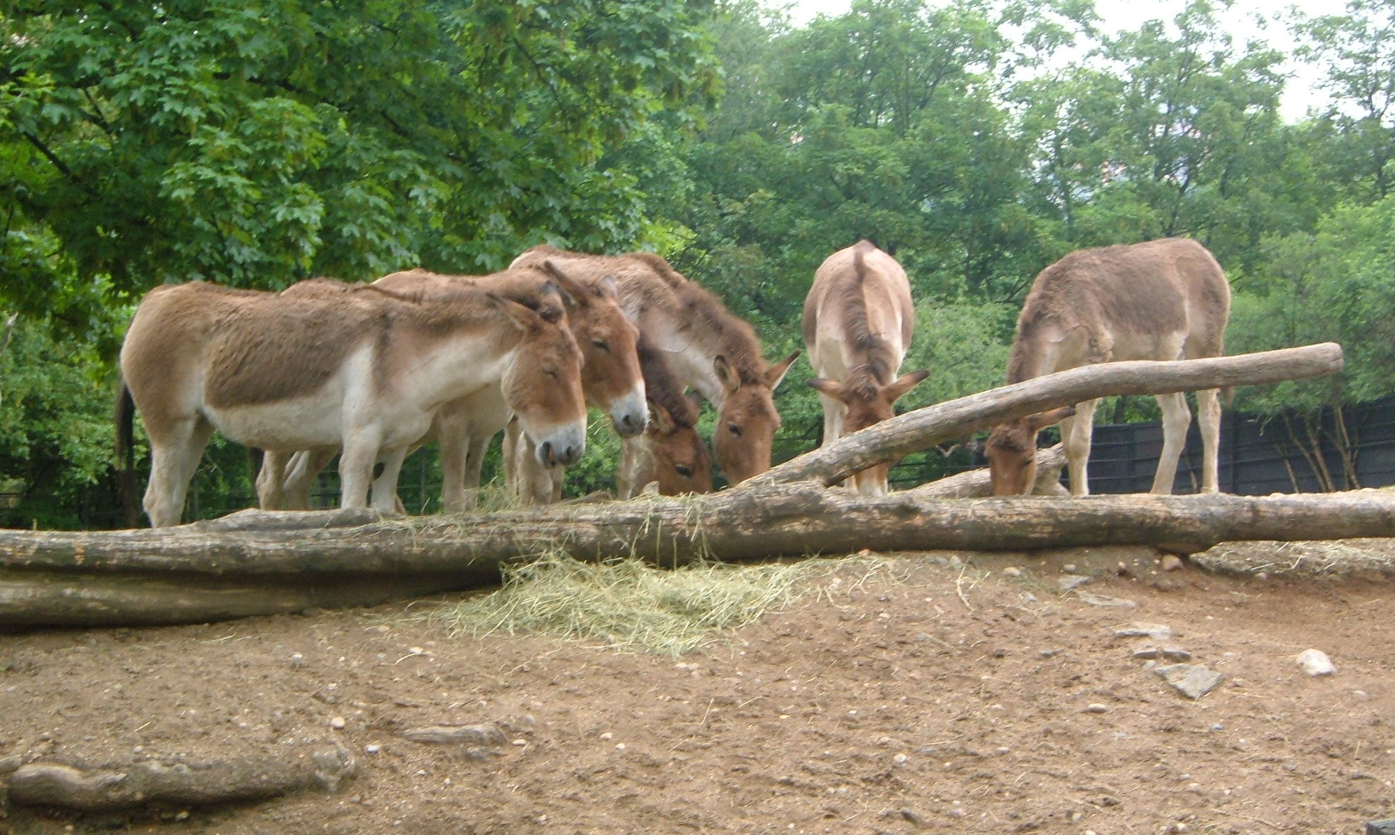 Kiang